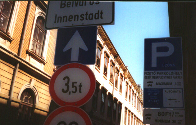 Zweisprachige Beschilderung in Ödenburg/Sopron in Ungarn. Bilingual signage in Ödenburg/Sopron, Hungary.